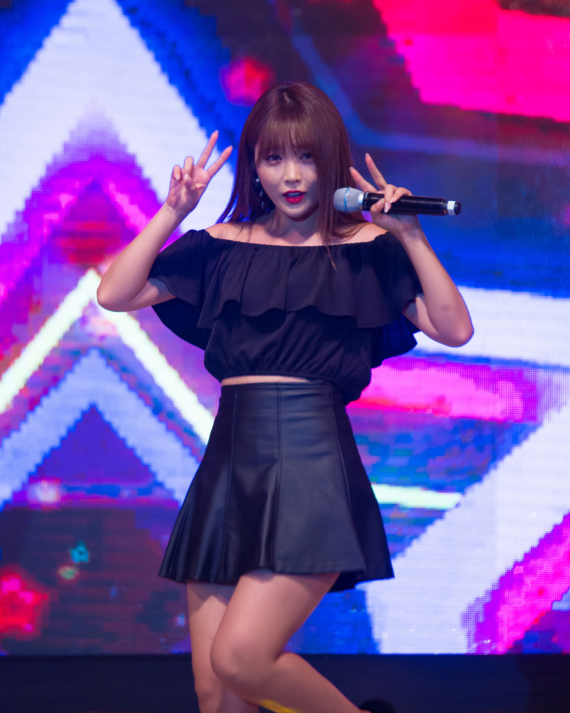 20170624 홍진영 제천문화축제